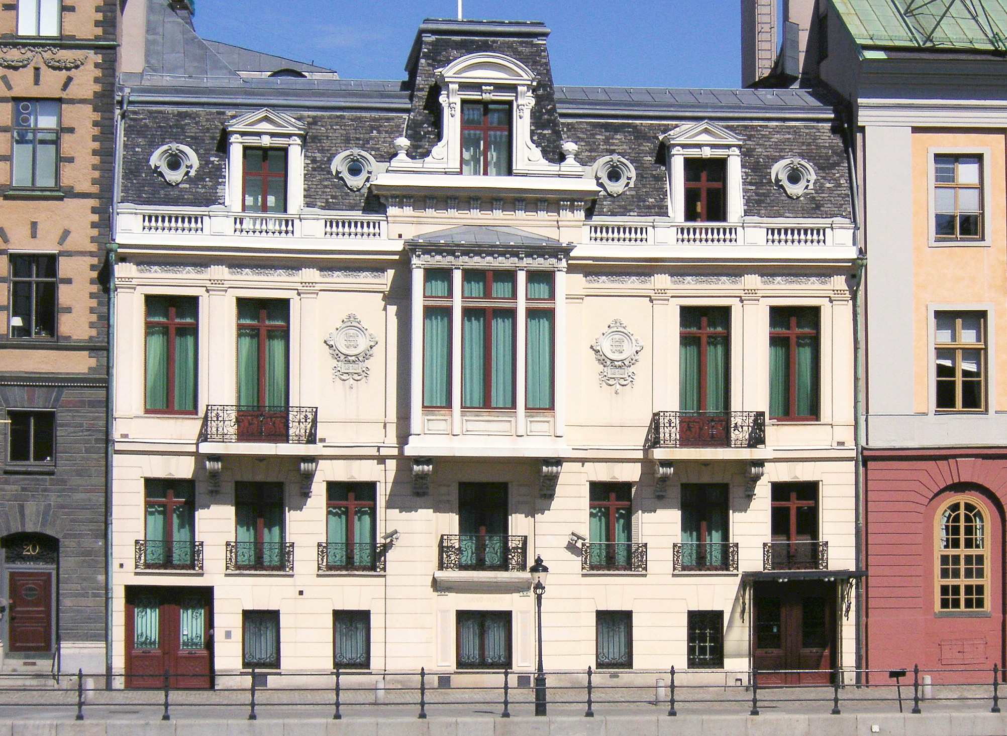 Sagerska huset eller Sagerska palatset vid Strömgatan i Stockholm